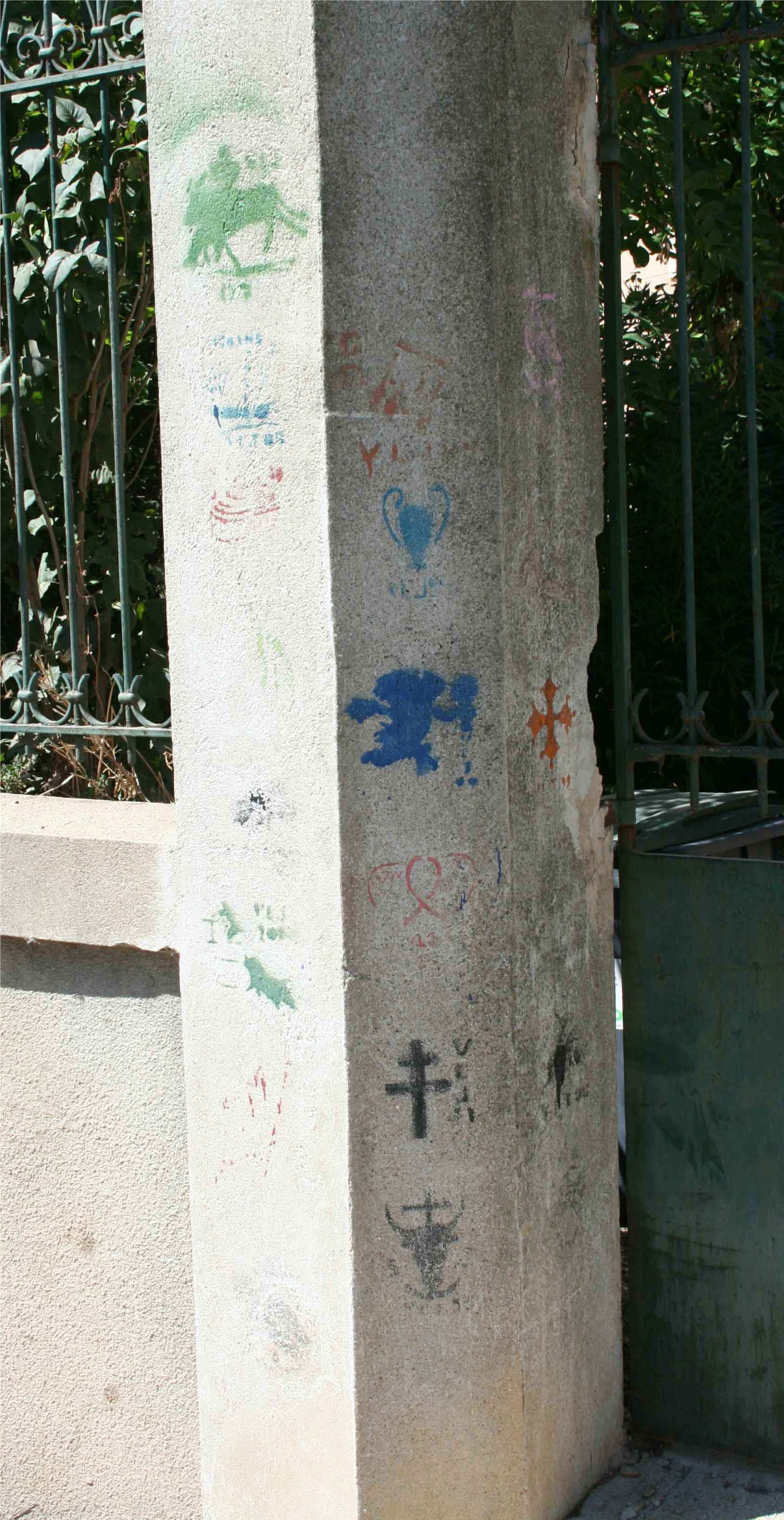 EMPEGUE sur montant d'un portail